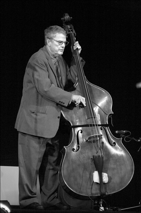 Charlie Haden, american jazz bassist